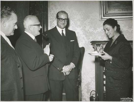 Foto scattata durante la celebrazione del ventennale del voto alle donne (20 gennaio 1965). Nella foto Giulietta Fibbi con Sandro Pertini e Francesco Cosentino. Foto tratta dall'archivio fotografico della IV Legislatura della Repubblica Italiana.